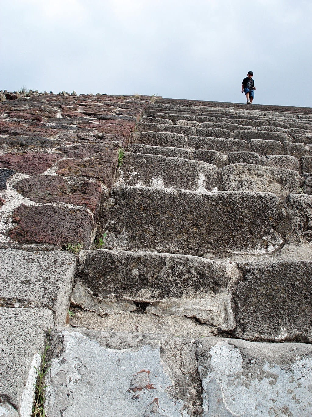 Garçon mexicain descendant l'escalier de la pyramide du Soleil, Teotihuacan, Mexico.